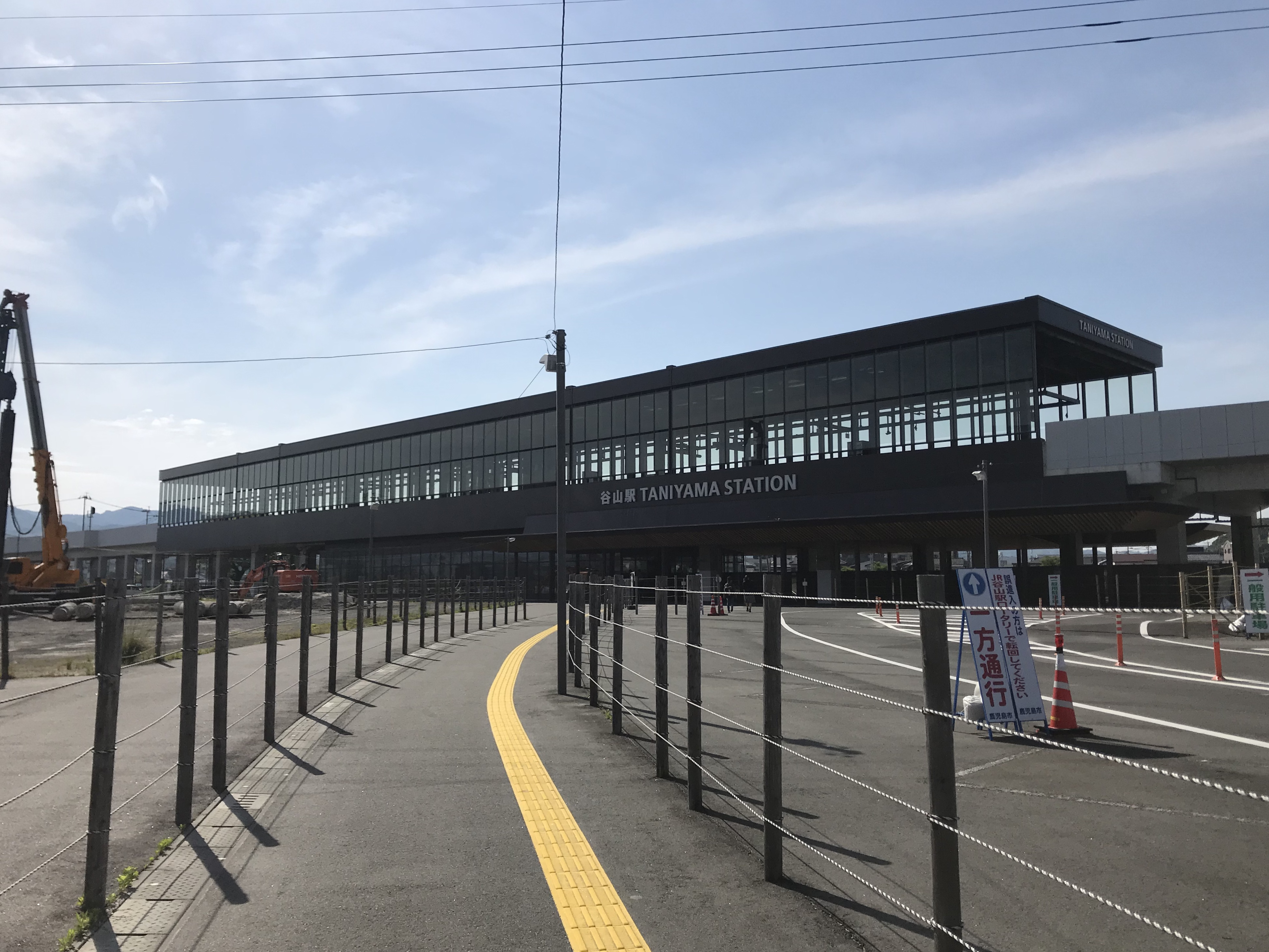 谷山駅(JR)の駅舎